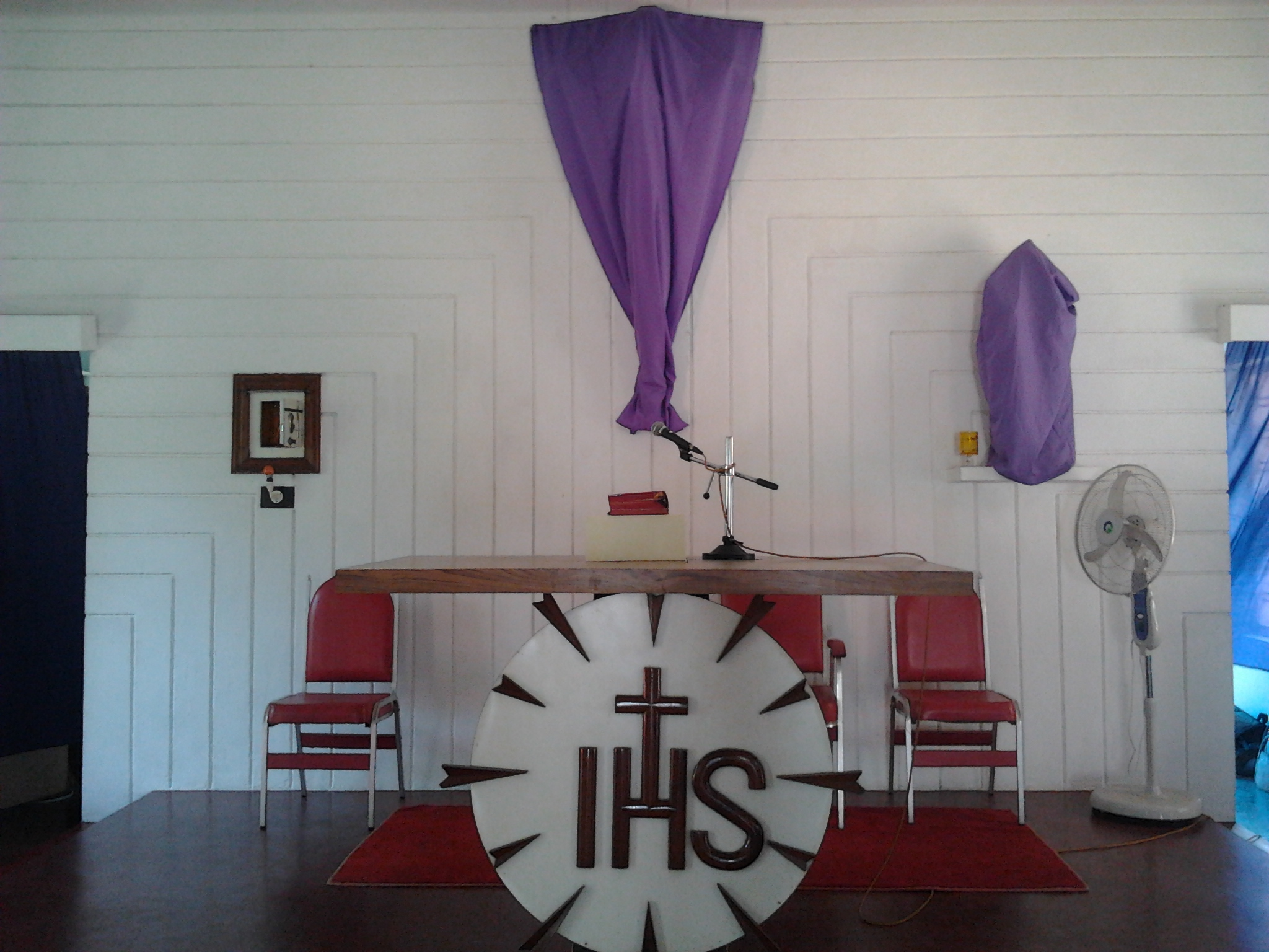 പെസഹാ വ്യാഴാഴ്ചയിലെ തിരുക്കർമ്മങ്ങൾക്ക് ശേഷം ശൂന്യമാപ്പെട്ട അൾത്താര . അൾത്താര വിരികൾ, വിളക്കുകൾ തുടങ്ങിയ എല്ലാം തന്നെ അൾത്താരയിൽ നിന്ന് മാറ്റിയിരിക്കുന്നു. ക്രൂശിത രൂപങ്ങൾ മറച്ചു വെച്ചിരിക്കുന്നു.